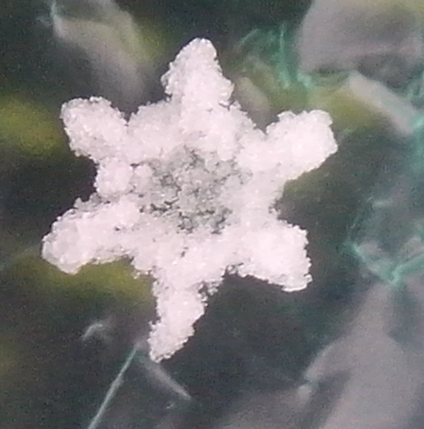 Schneeflocke wird zu Graupel